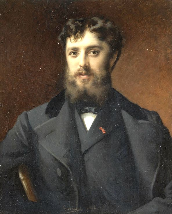 Portait de Lucien MAGNE (non daté) par Félix-Henri GIACOMOTTI (1828-1909)